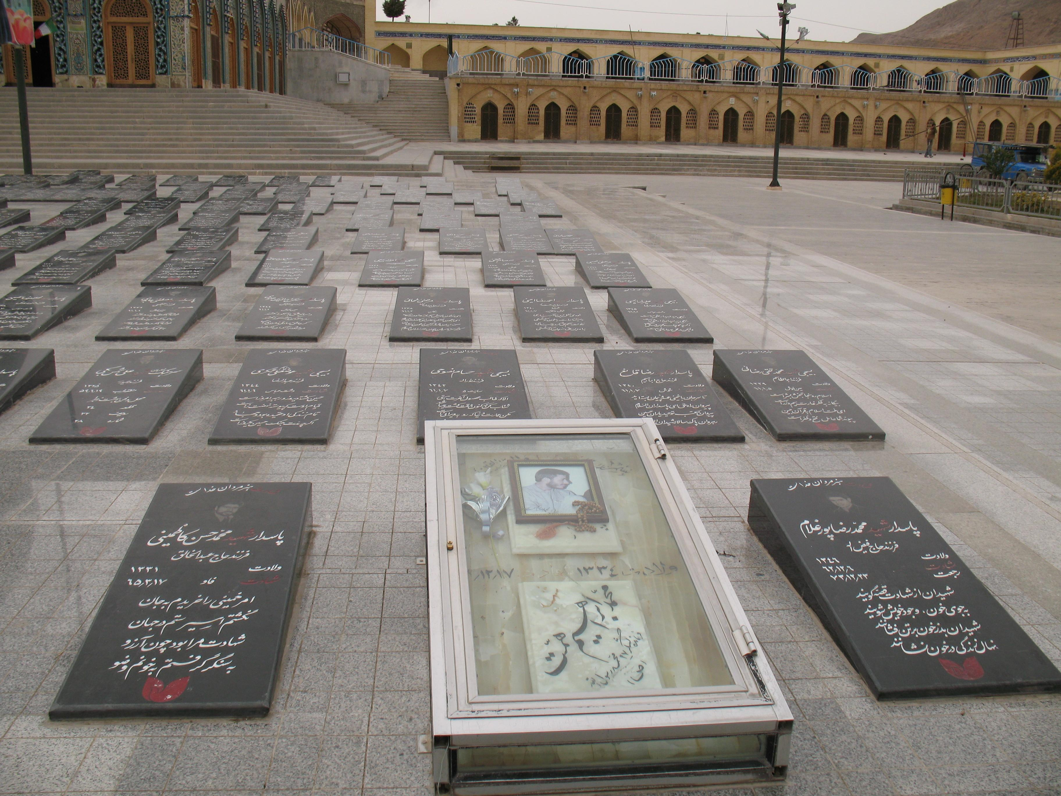 Mohammad Ebrahim Hemmat tomb